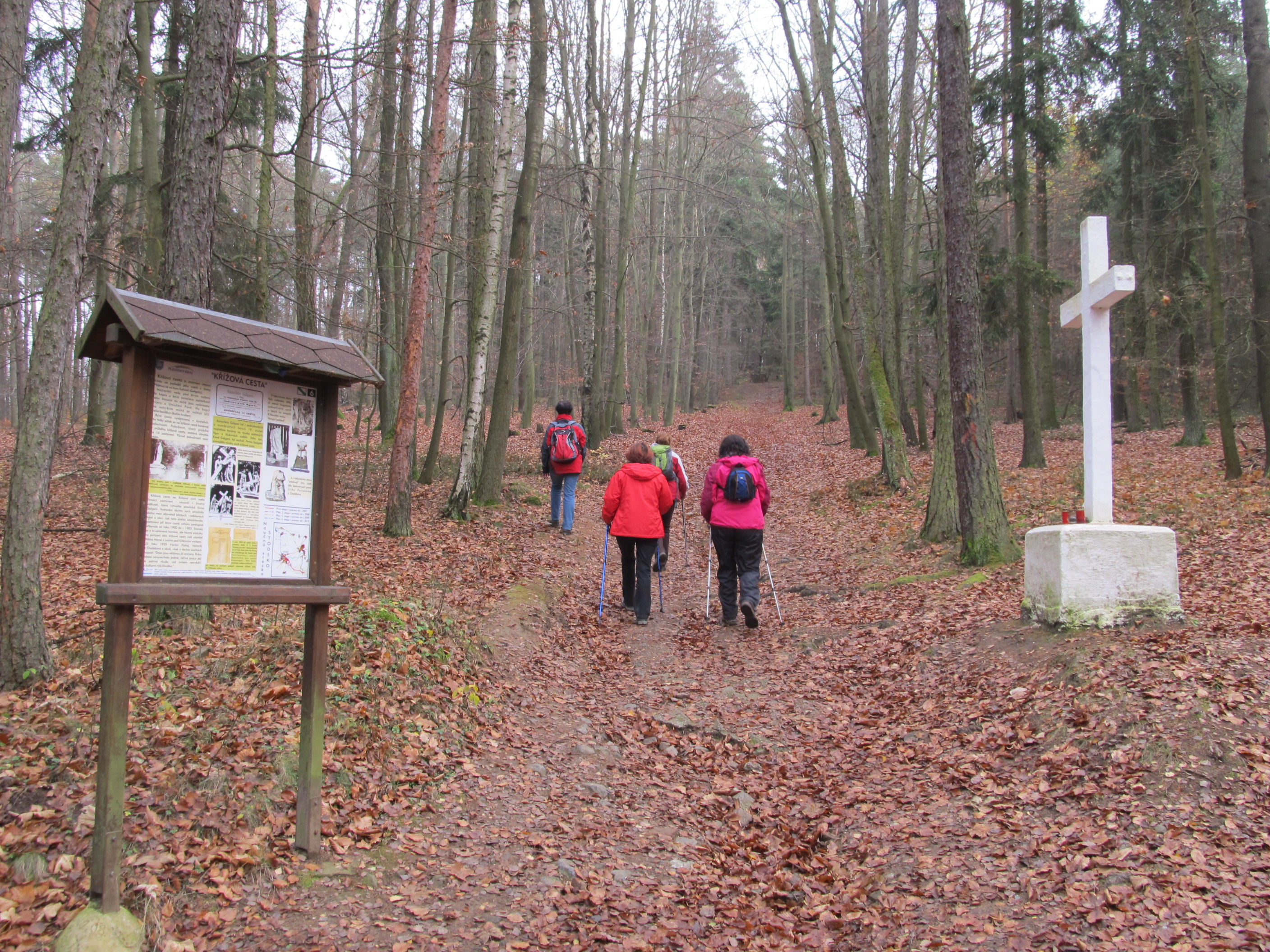 Křížový vrch - tudy kdysi vedla na vrchol křížová cesta